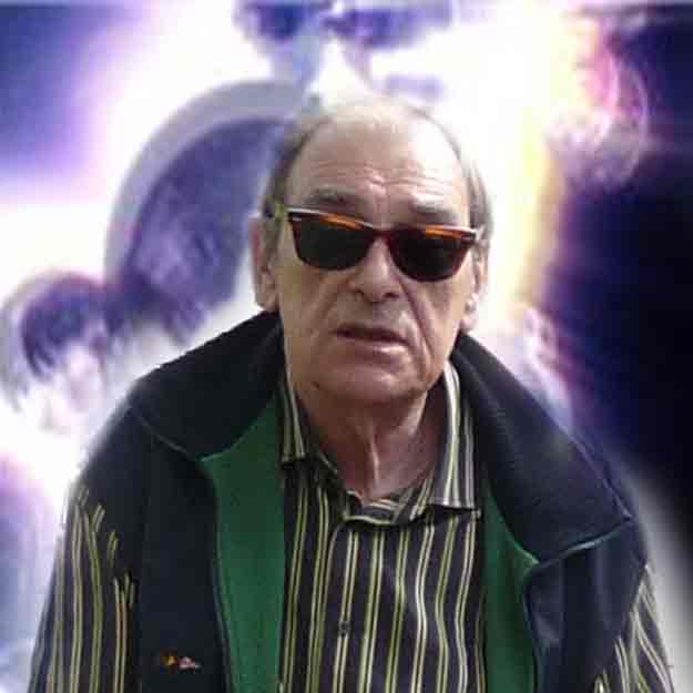 выкадровка из общего фото на отдыхе в Италии